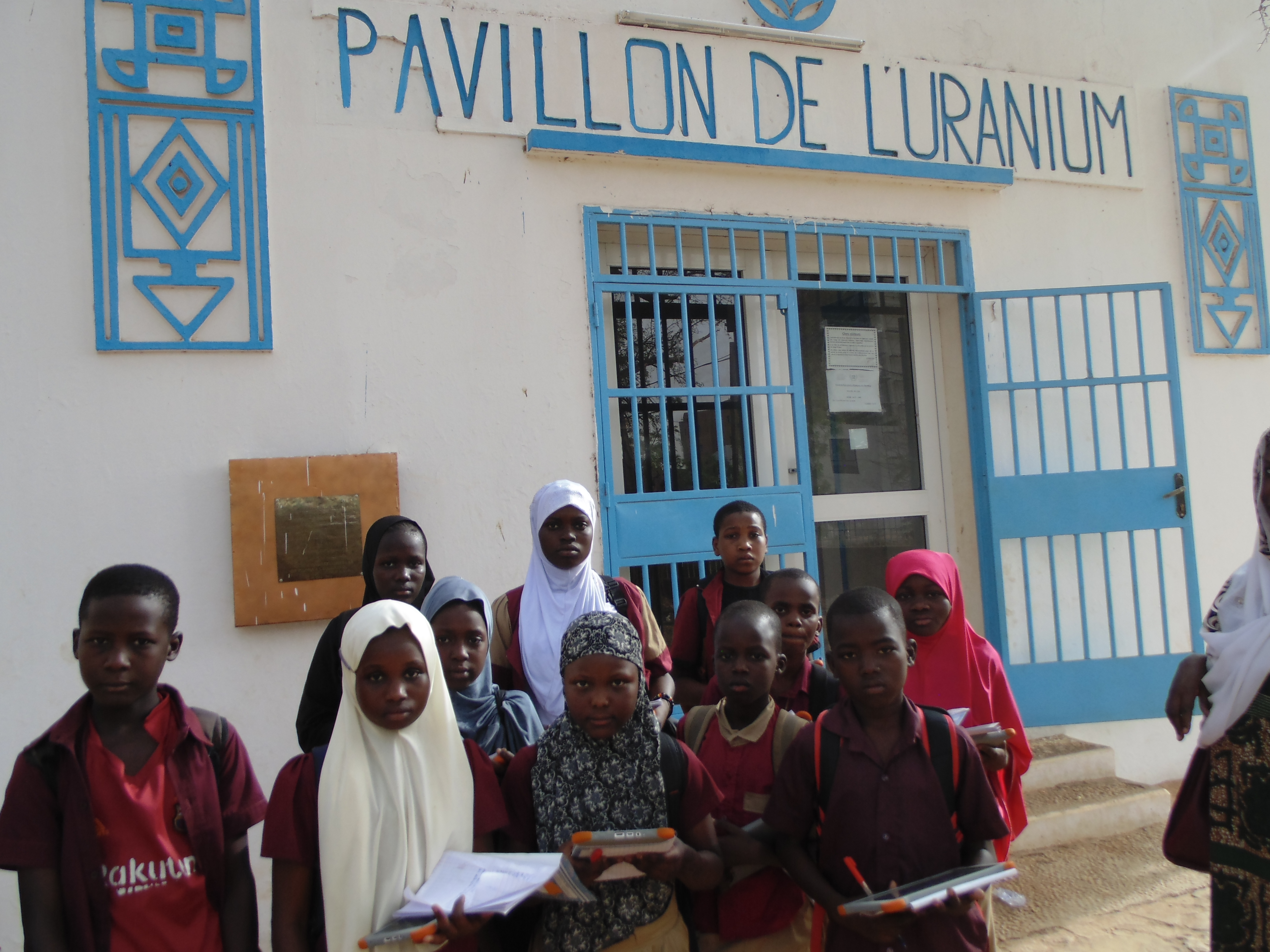 WikiChallenge 2019